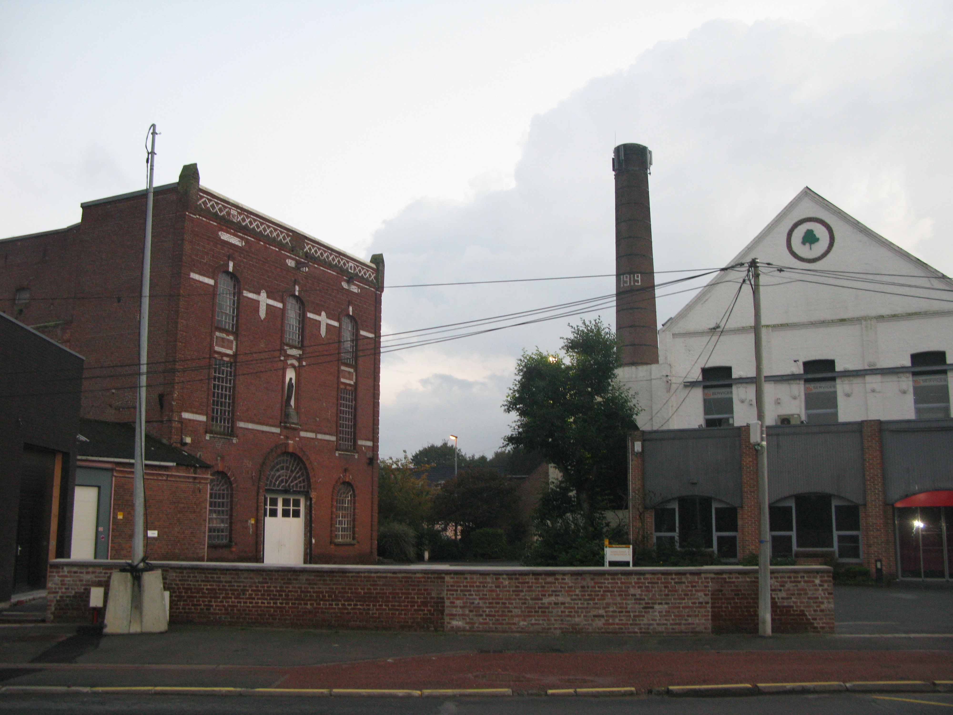 Ancienne distillerie d'Ascq, parc de la Plaine, Villeneuve d'Ascq